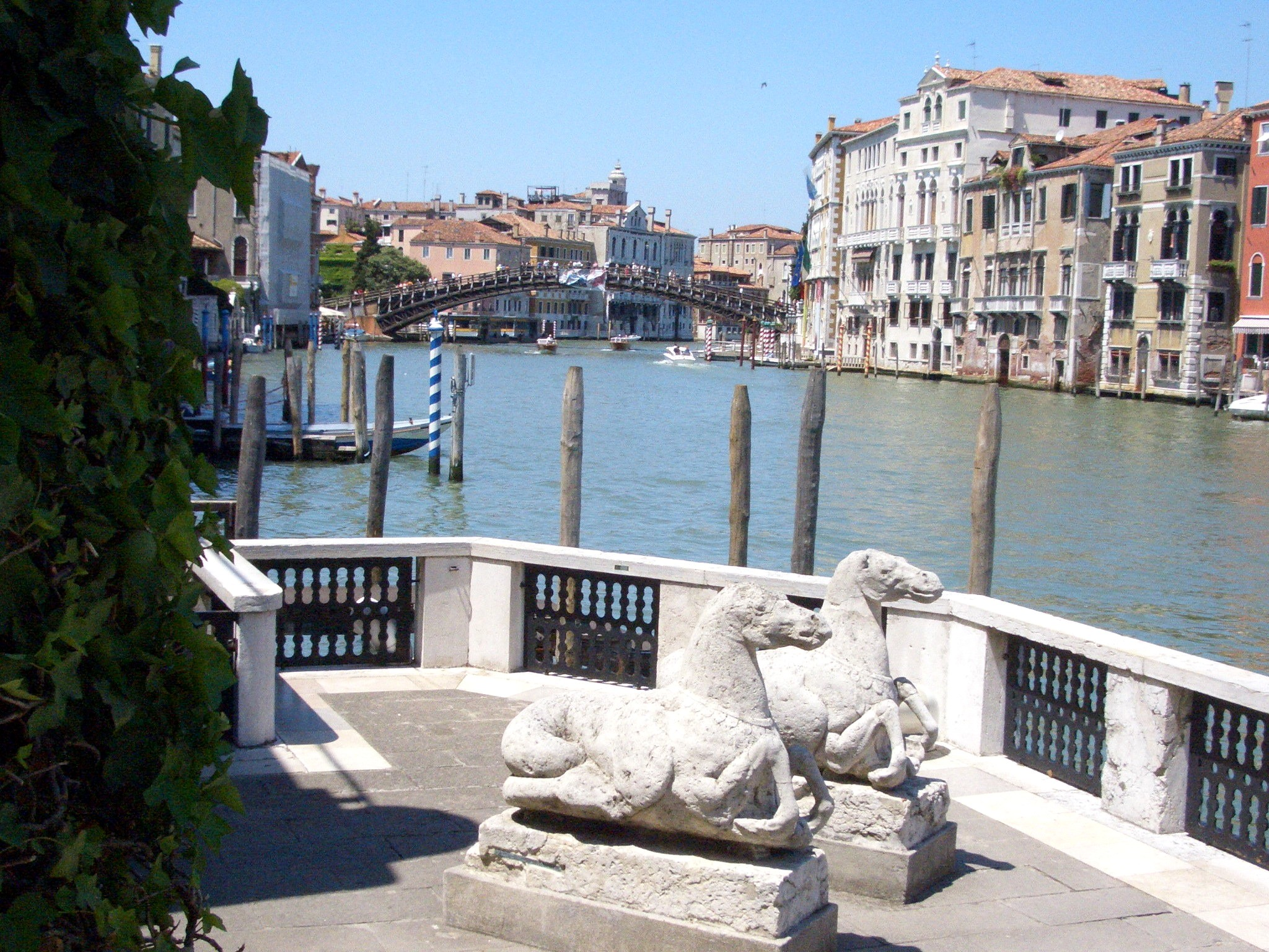 Venezia - Museo Guggenheim, la loggia esterna con vista sul Canal Grande